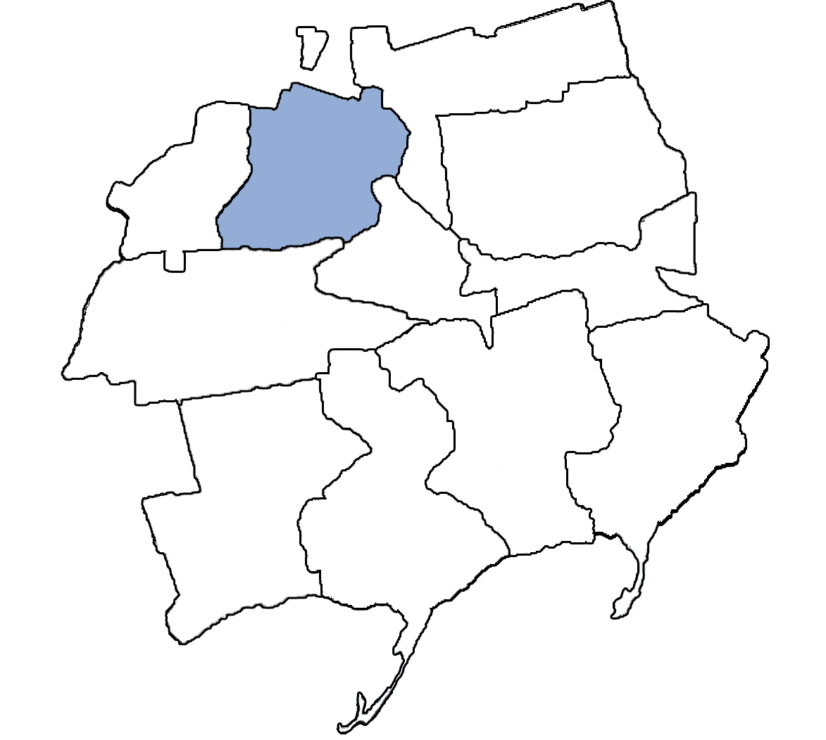 Карта Бердянської округи Петропавлівського району